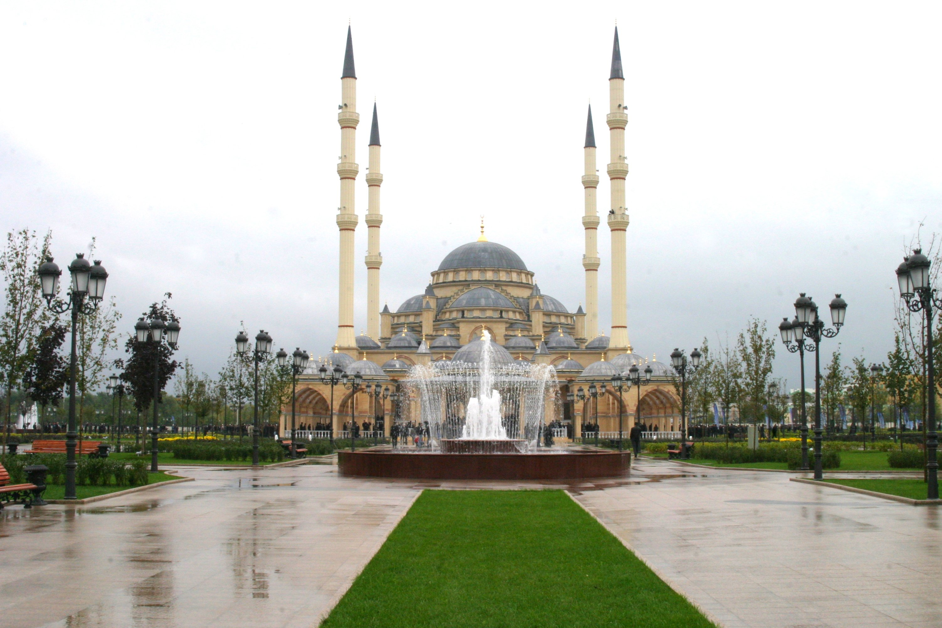 Achmat-Kadyrow-Moschee in Grosny / Tschetschenien, die grösste Moschee in Russland und des europäischen Kontinents.